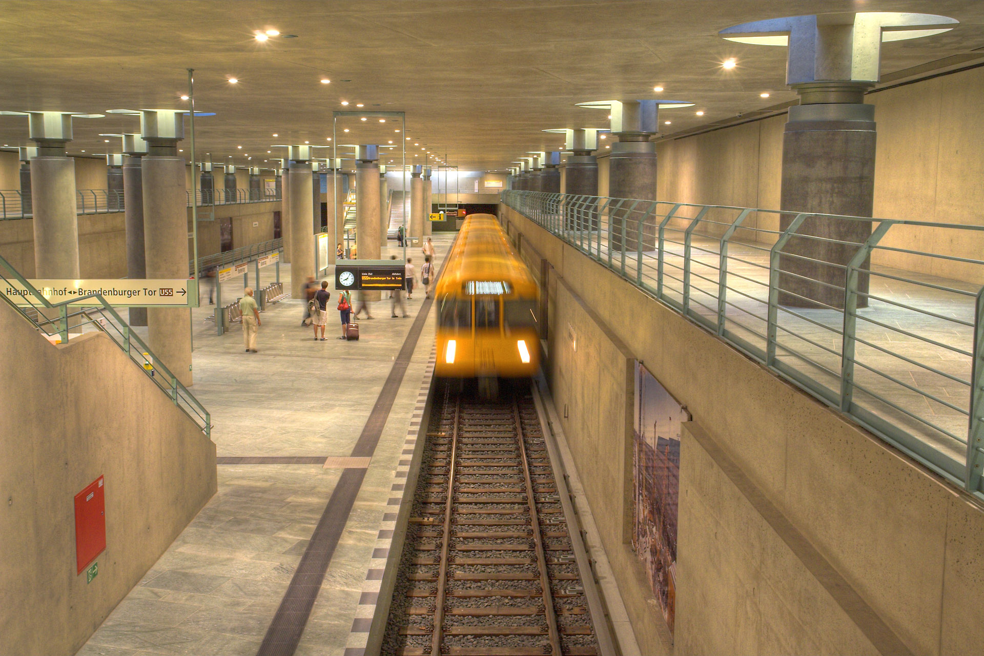 U55 – Bundestag. Langzeitbelichtung mit einfahrendem Zug. Aus RAW-Datei erzeugte HDR-Aufnahme.